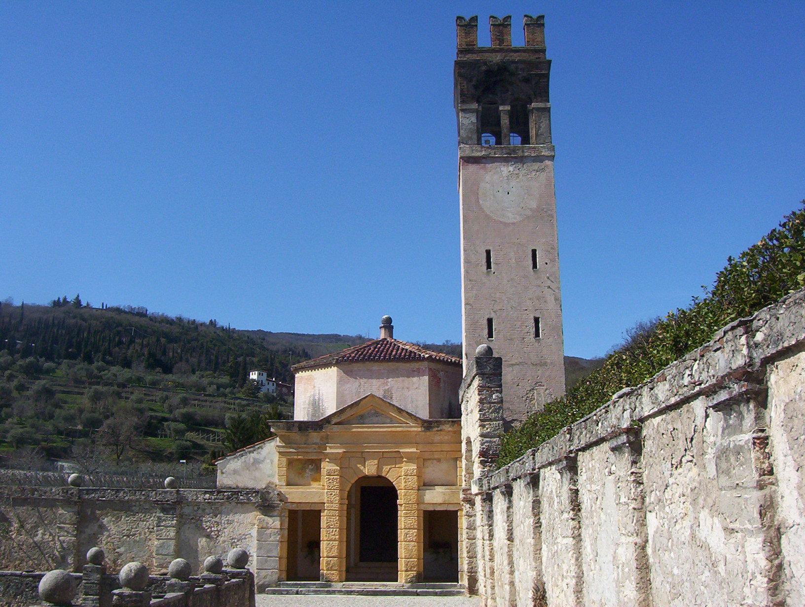 Chiesetta della villa della Torre a Fumane (provincia di Verona)